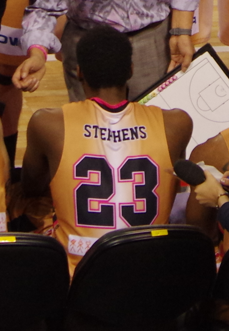 ｂｊリーグ 2013-2014シーズン プレイオフ ファイナルズ_026